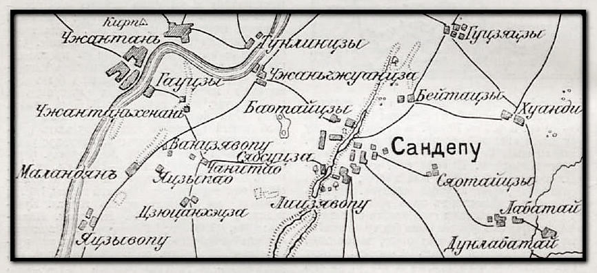 Данное изображение было использовано в статье «Баотайцзы» опубликованной в четвёртом томе «Военной энциклопедии», который был издан книгоиздательским товариществом Ивана Дмитриевича Сытина в 1911 году в столице Российской империи городе Санкт-Петербурге.